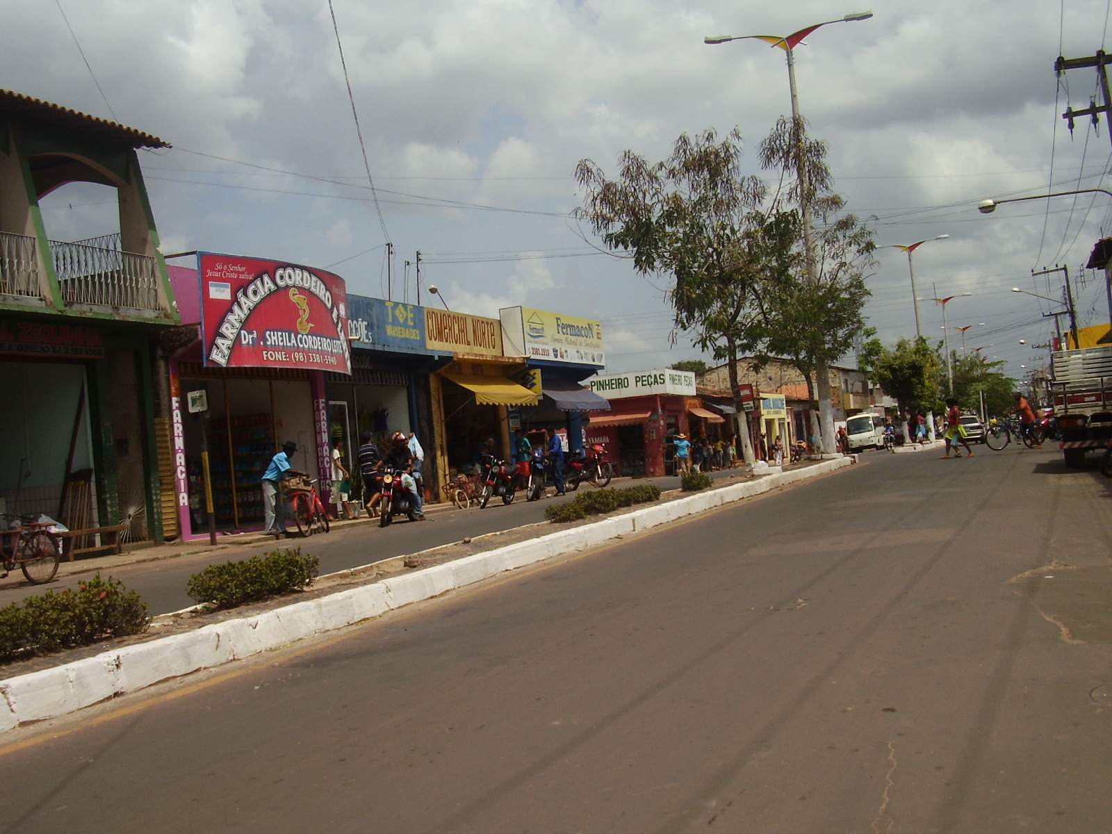 Avenida principal de Pinheiro, Maranhão.